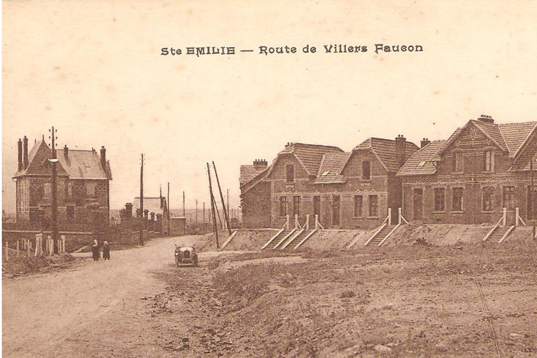 Sainte-Emilie en reconstruction vers 1920.